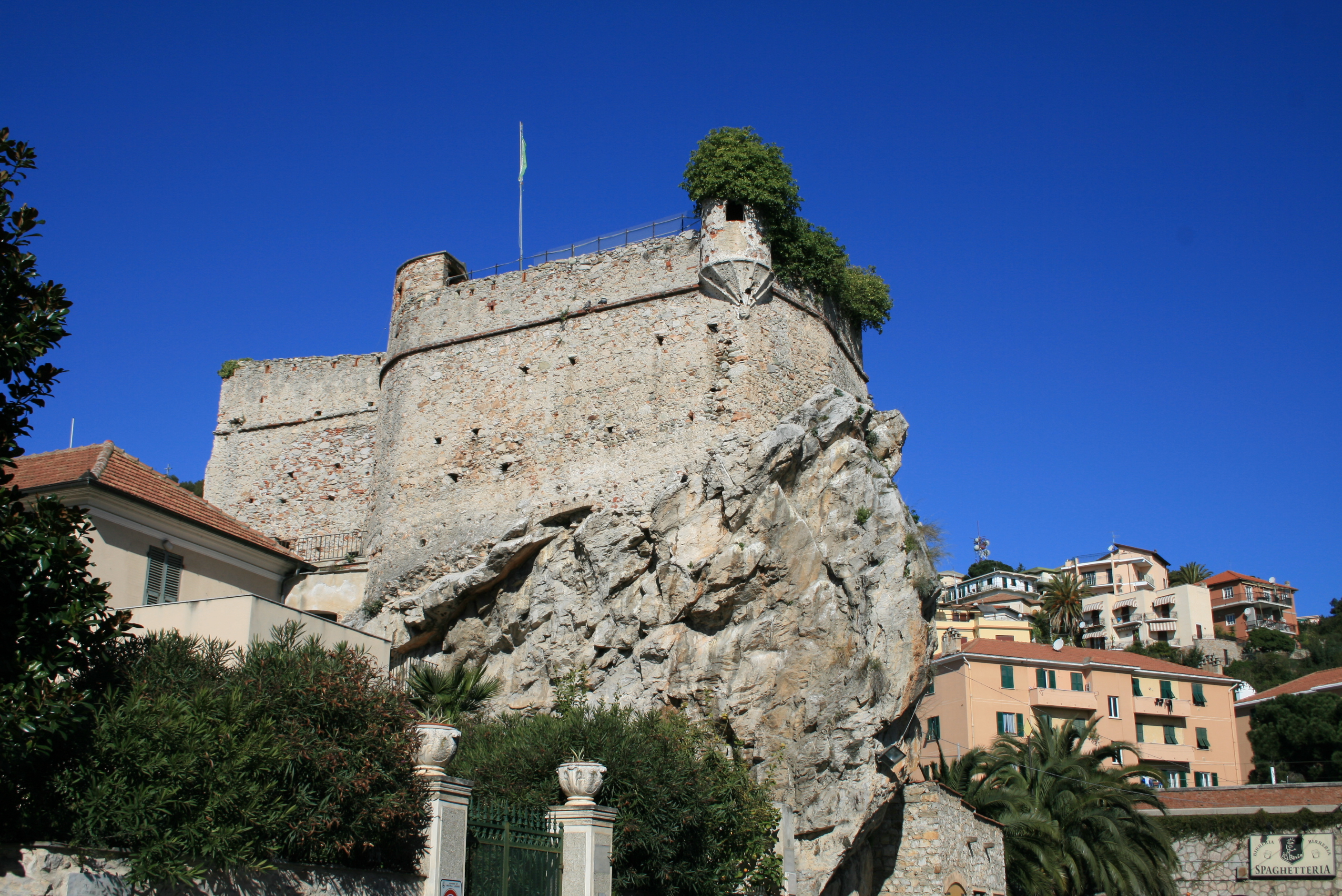 Pietra Ligure Catello